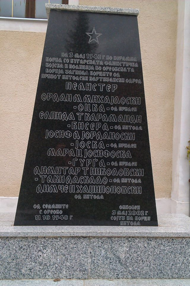 Споменик за Битолскиот партизански одред „Пелистер“ во селото Ореово